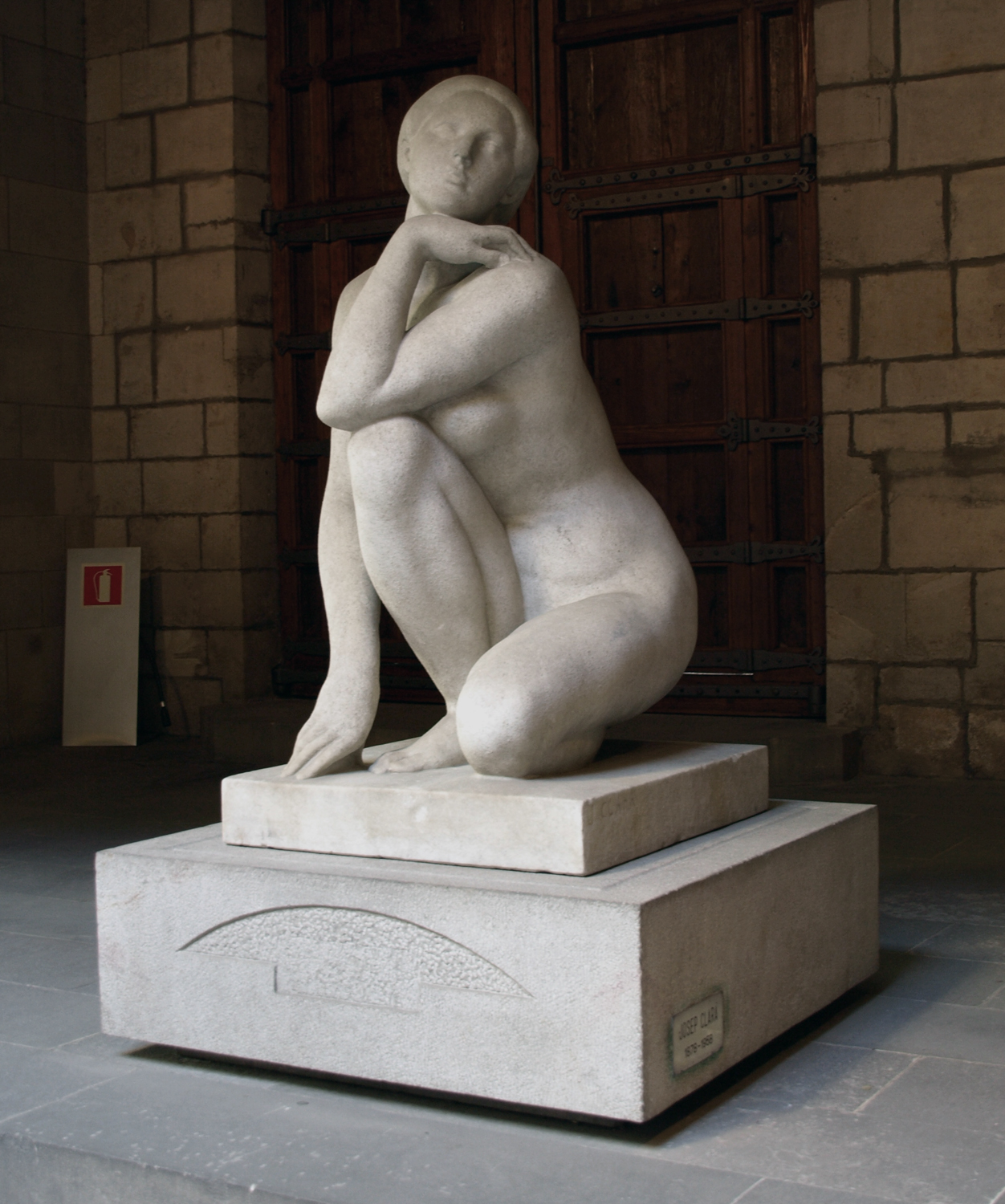 "La Diosa", de Josep Clarà (Ayuntamiento de Barcelona)